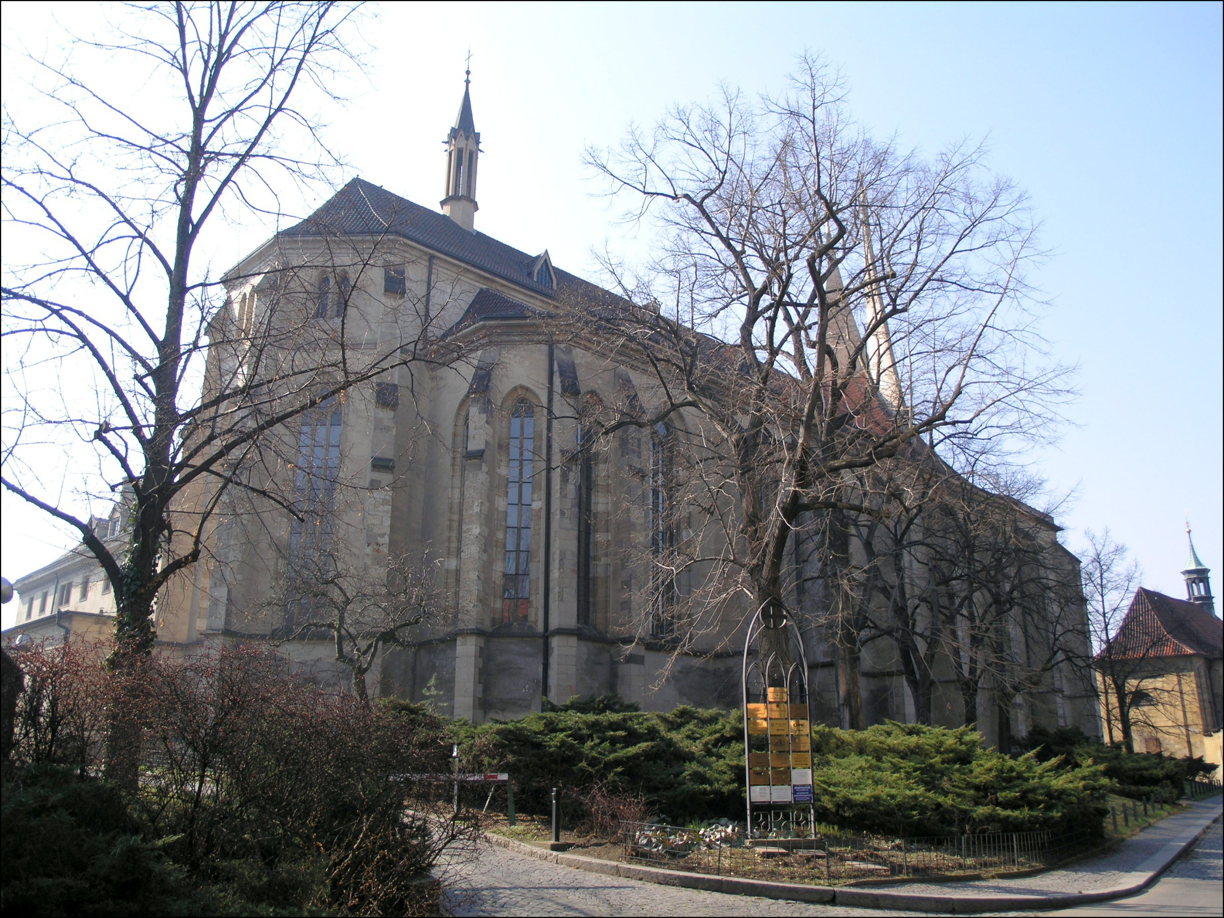 Praha, Nové Město - kostel Panny Marie na Slovanech